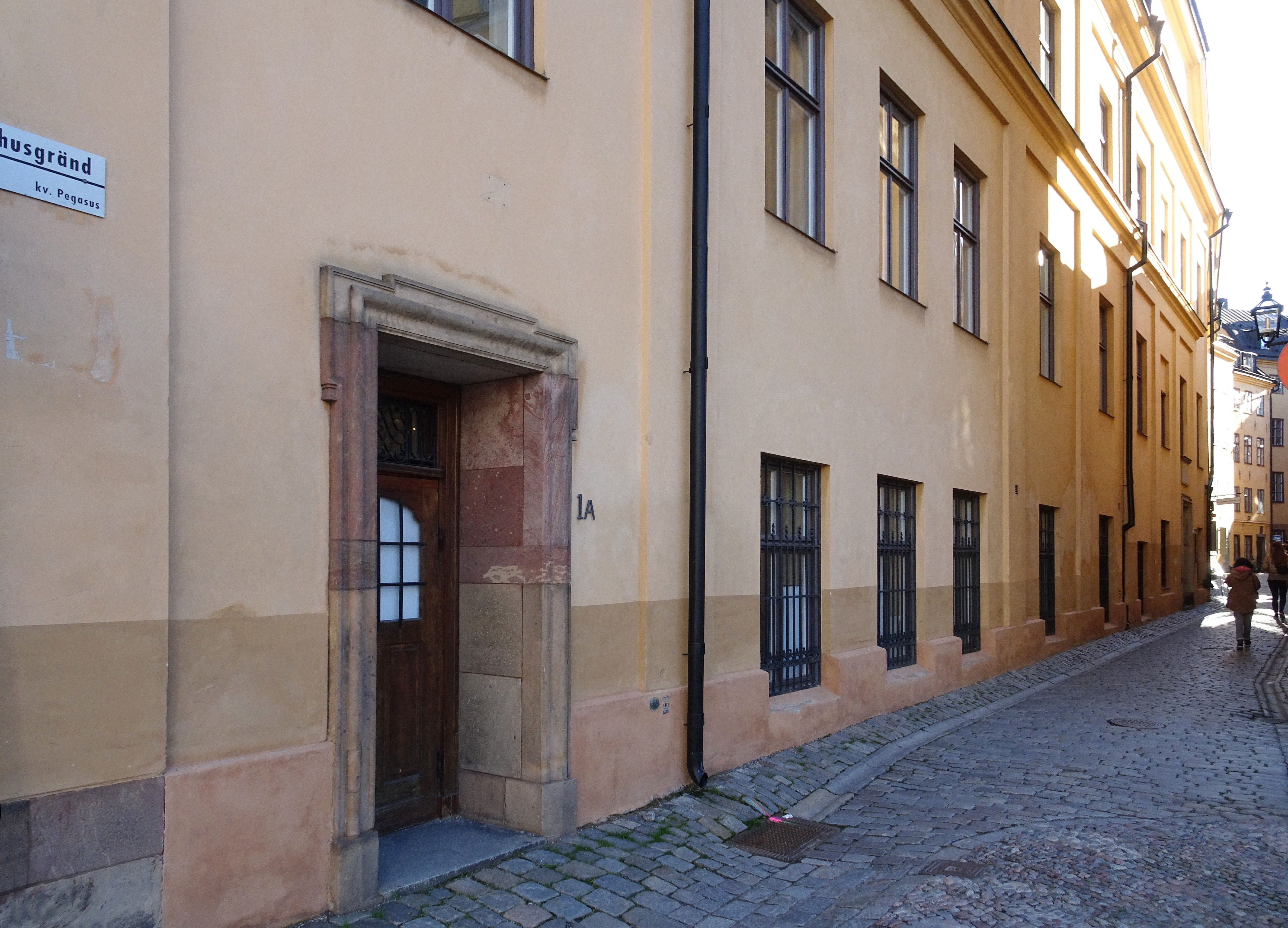 Bollhusgränd 1-7, här låg Skomakare-Källarens entré